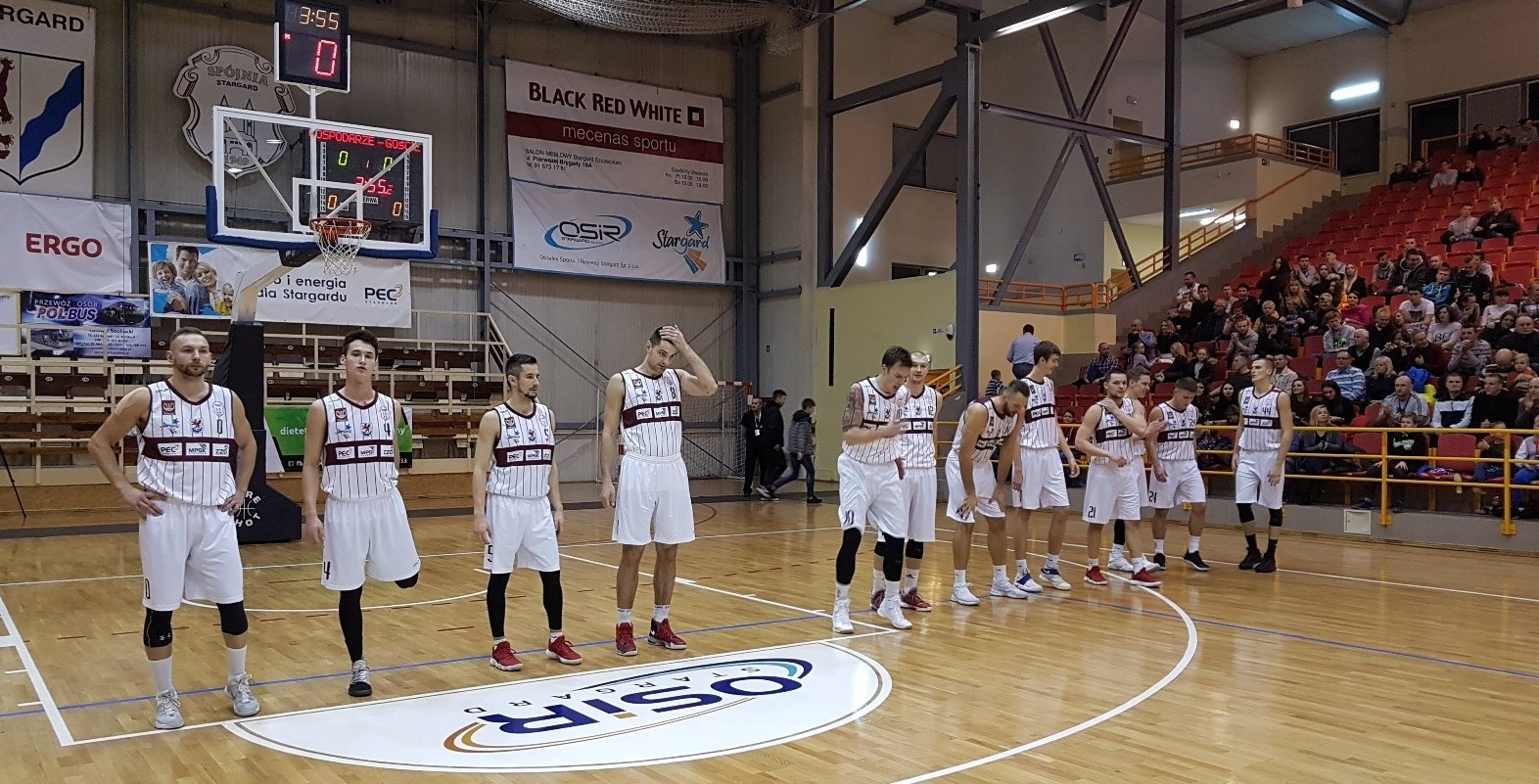 Stargard, 25.11.2017. Prezentacja Spójnii przed meczem z Pogonią Prudnik.